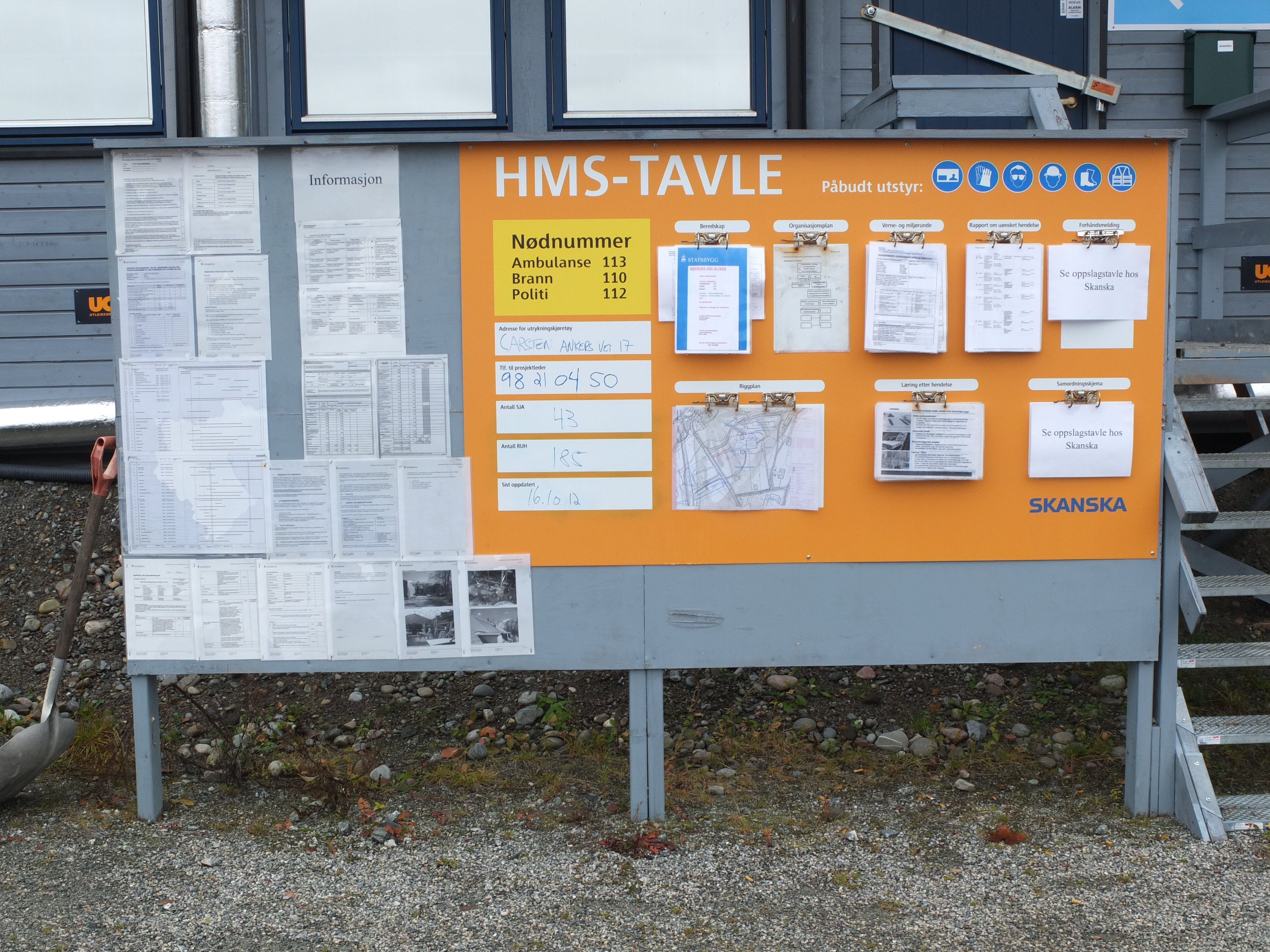 HMS-tavle ved anleggsbrakker ved Eidsvoll verk